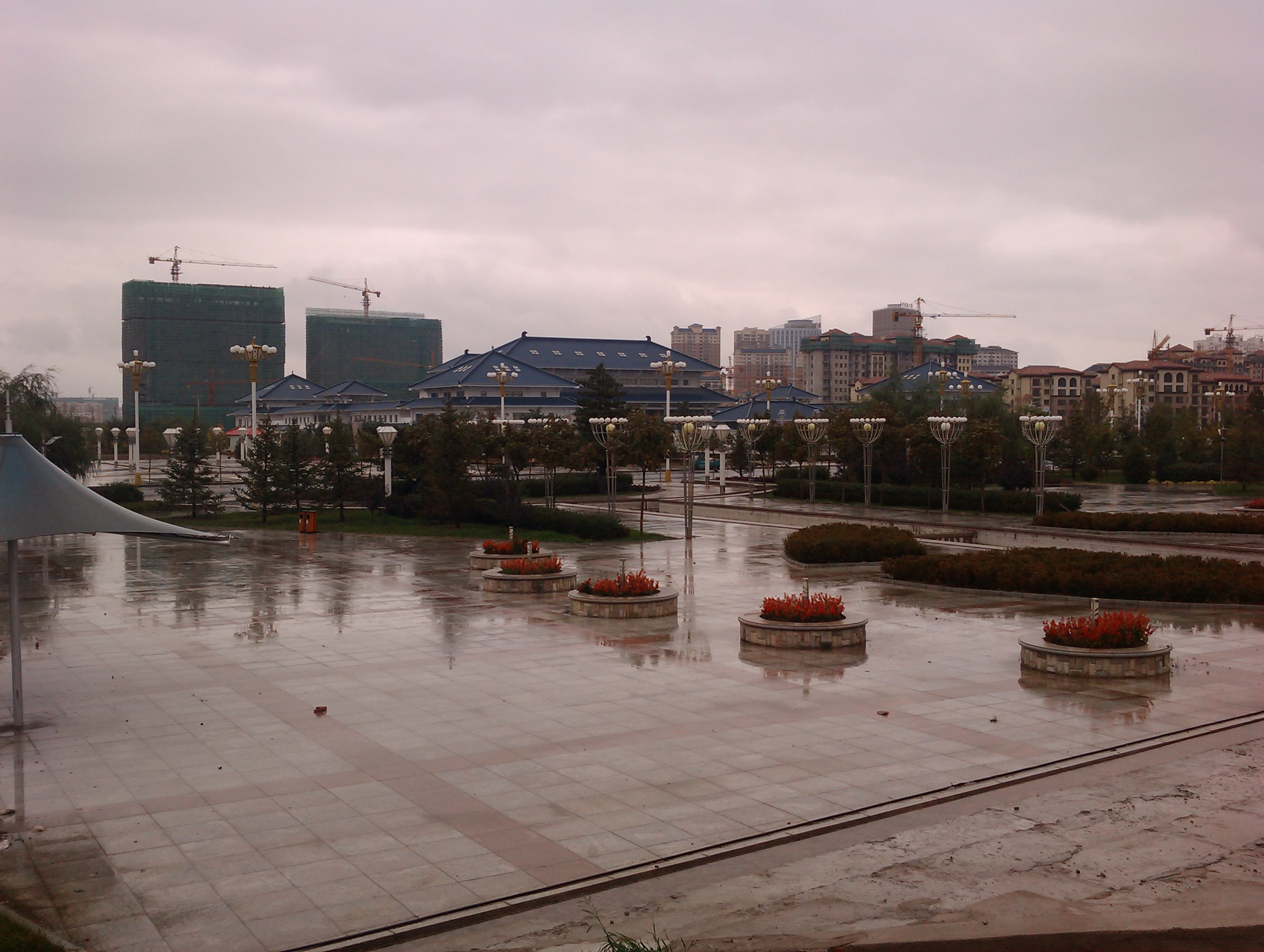 赤峰市博物馆